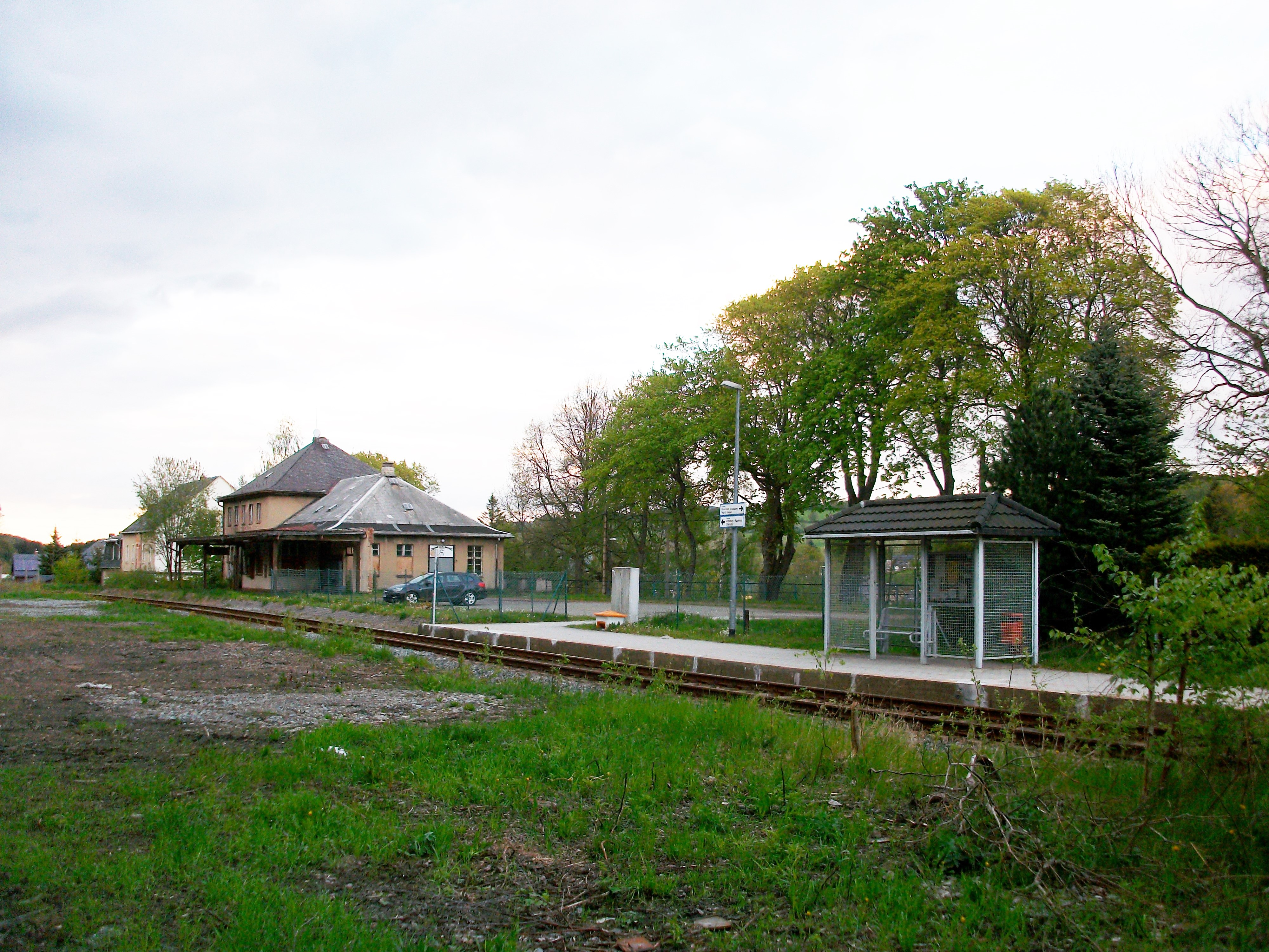 Haltepunkt Sehma mit ehem. Empfangsgebäude (2016)